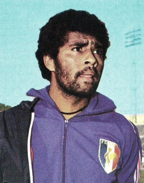 Paul Poaniewa en 1976 (JO), 'Montreal 76', Panini figurina n°129.